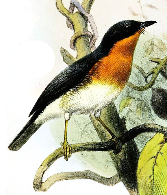 Cyornis rufigula = Ficedula rufigula